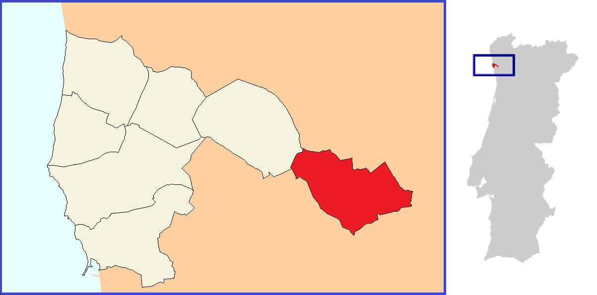 Mapa da freguesia de Balasar